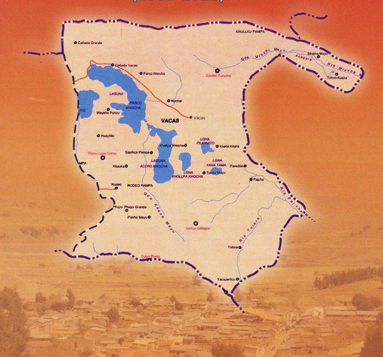 Mapa del Municipio de Vacas, Segunda Sección Municipal de la Provincia Arani, Cochabamba - Bolivia.